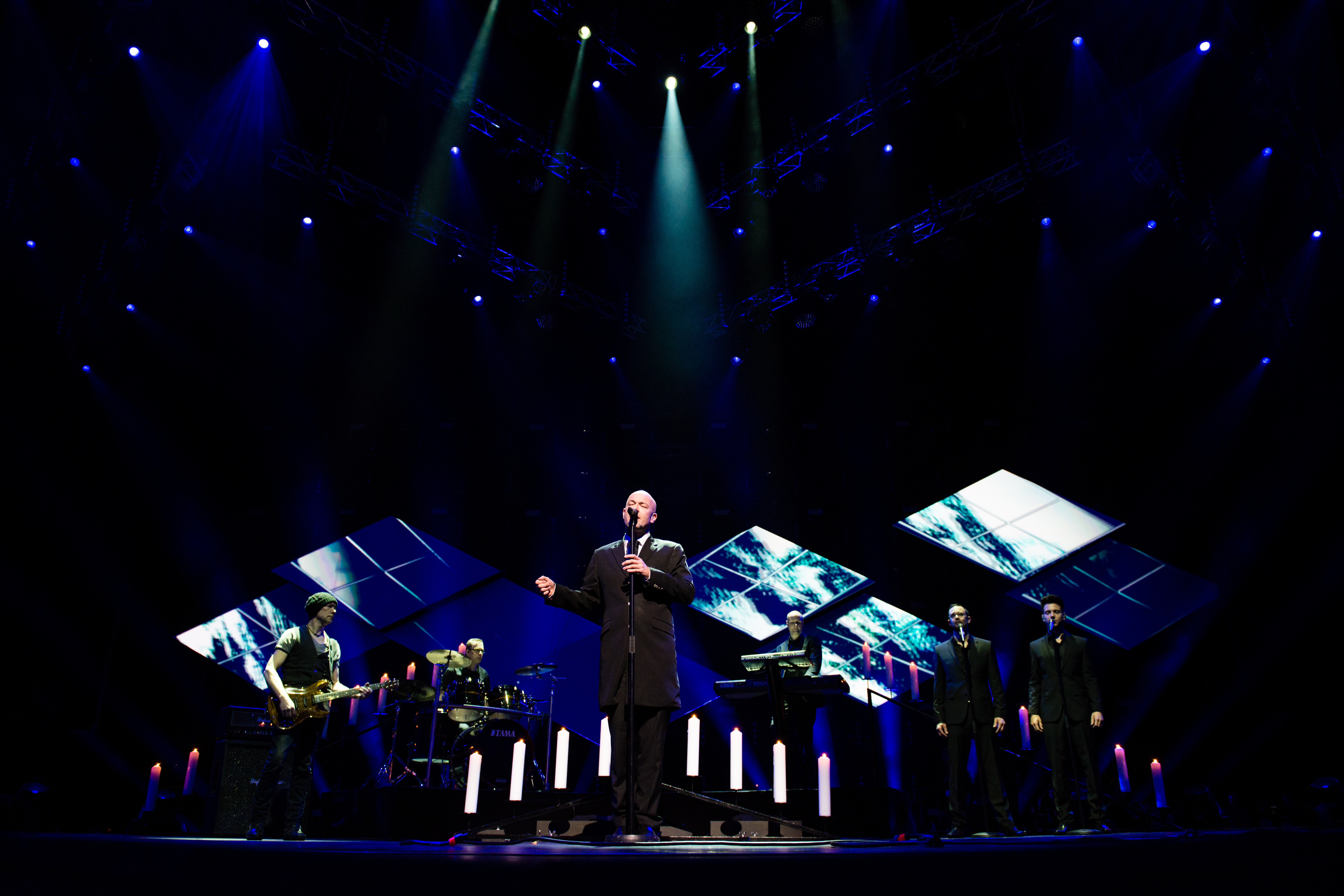 'Eurovision Song Contest 2014 - Unser Song für Dänemark': 'Unheilig'